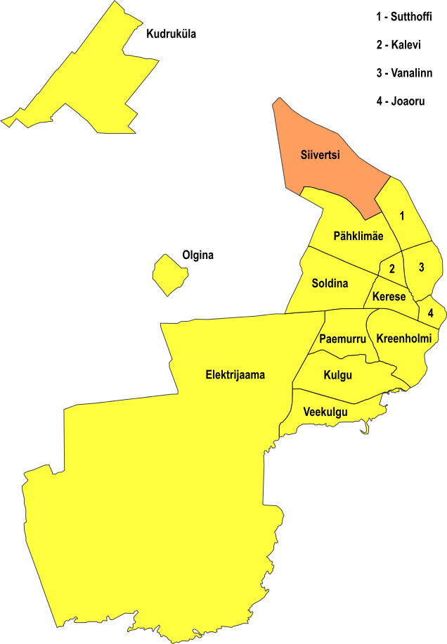 Narva linnaosa Siivertsi